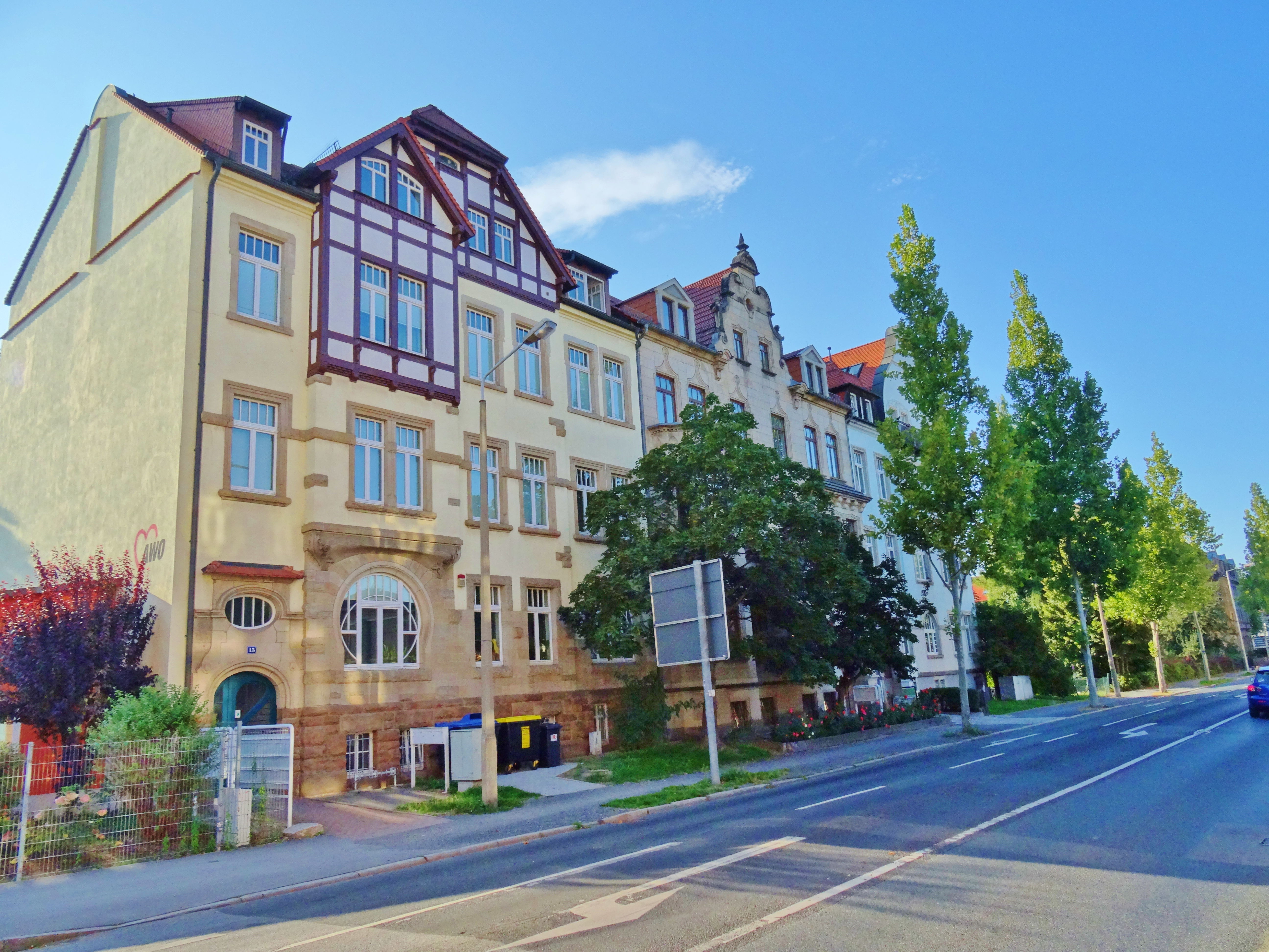 Pirna. Maxim-Gorki-Straße 15, 16, 17.